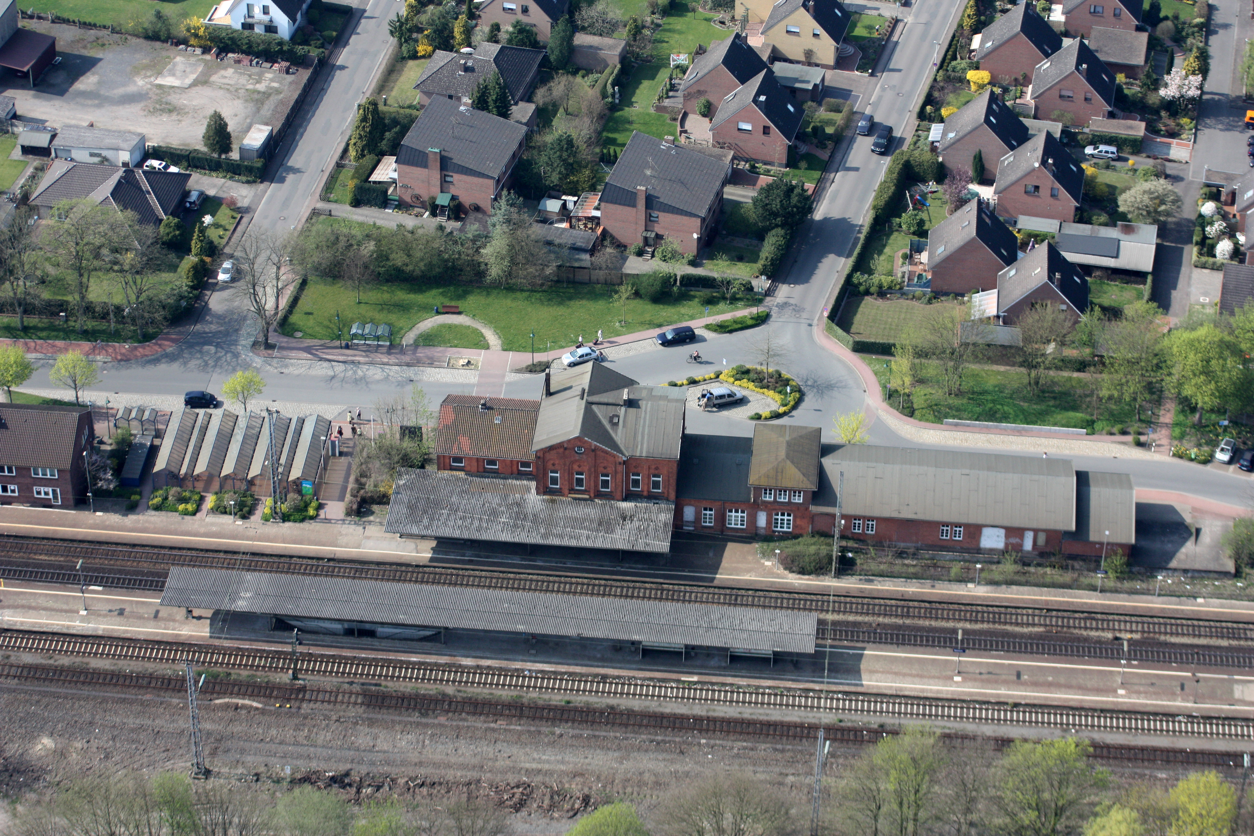 Luftbild des Bahnhofs Bassum